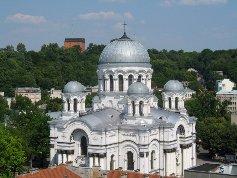 Šv. arkangelo Mykolo (Įgulos) bažnyčia, Kaunas.